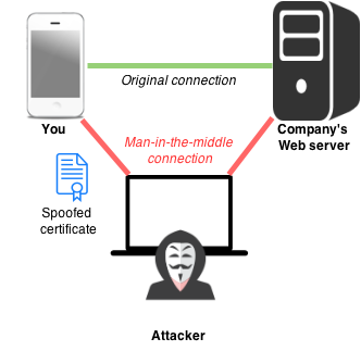 Монгол: Дундаас барьж авах халдлагын ерөнхий зураг